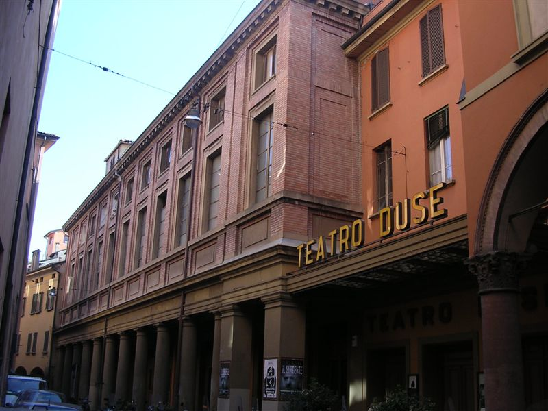 Il teatro intitolato a Eleonora Duse, a Bologna, Italy